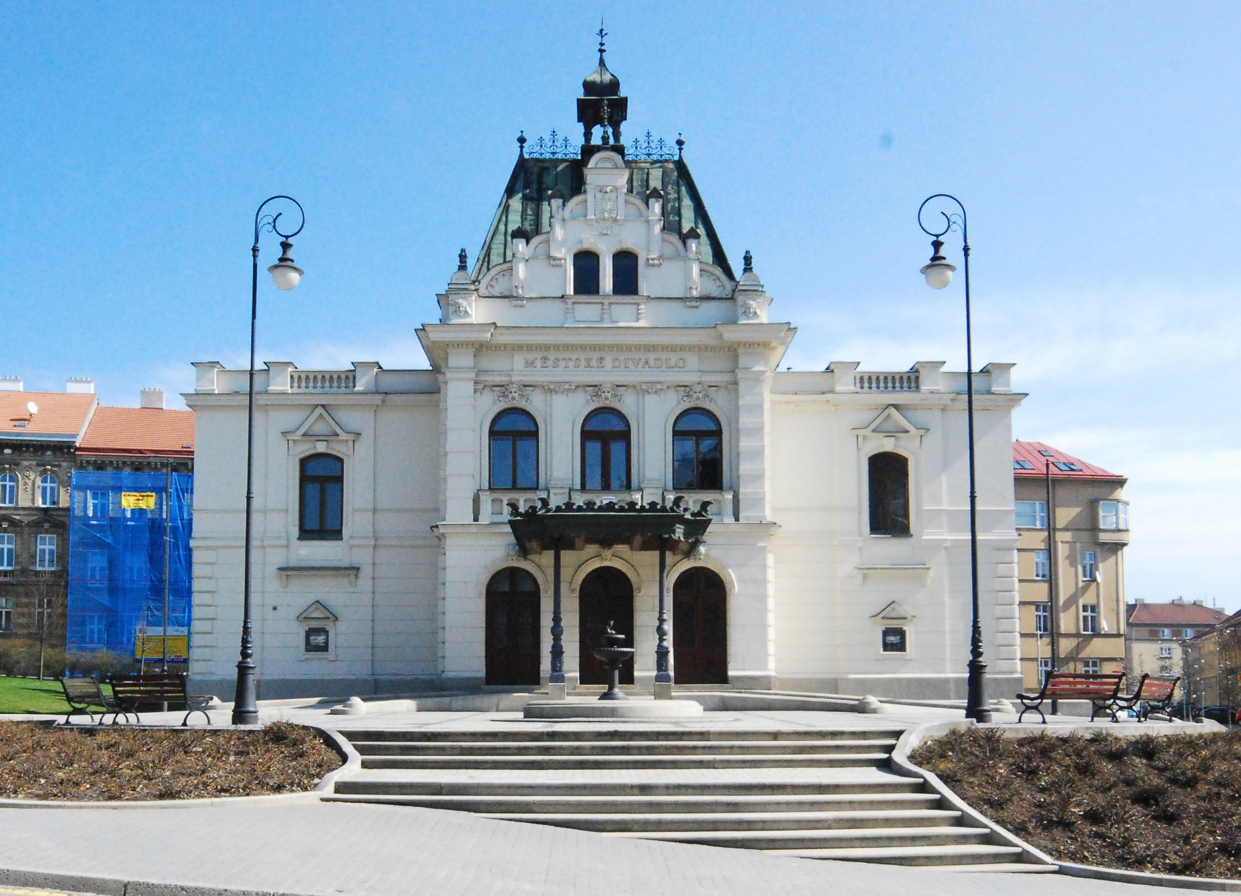 Městské divadlo Znojmo, náměstí Republiky 916/20.